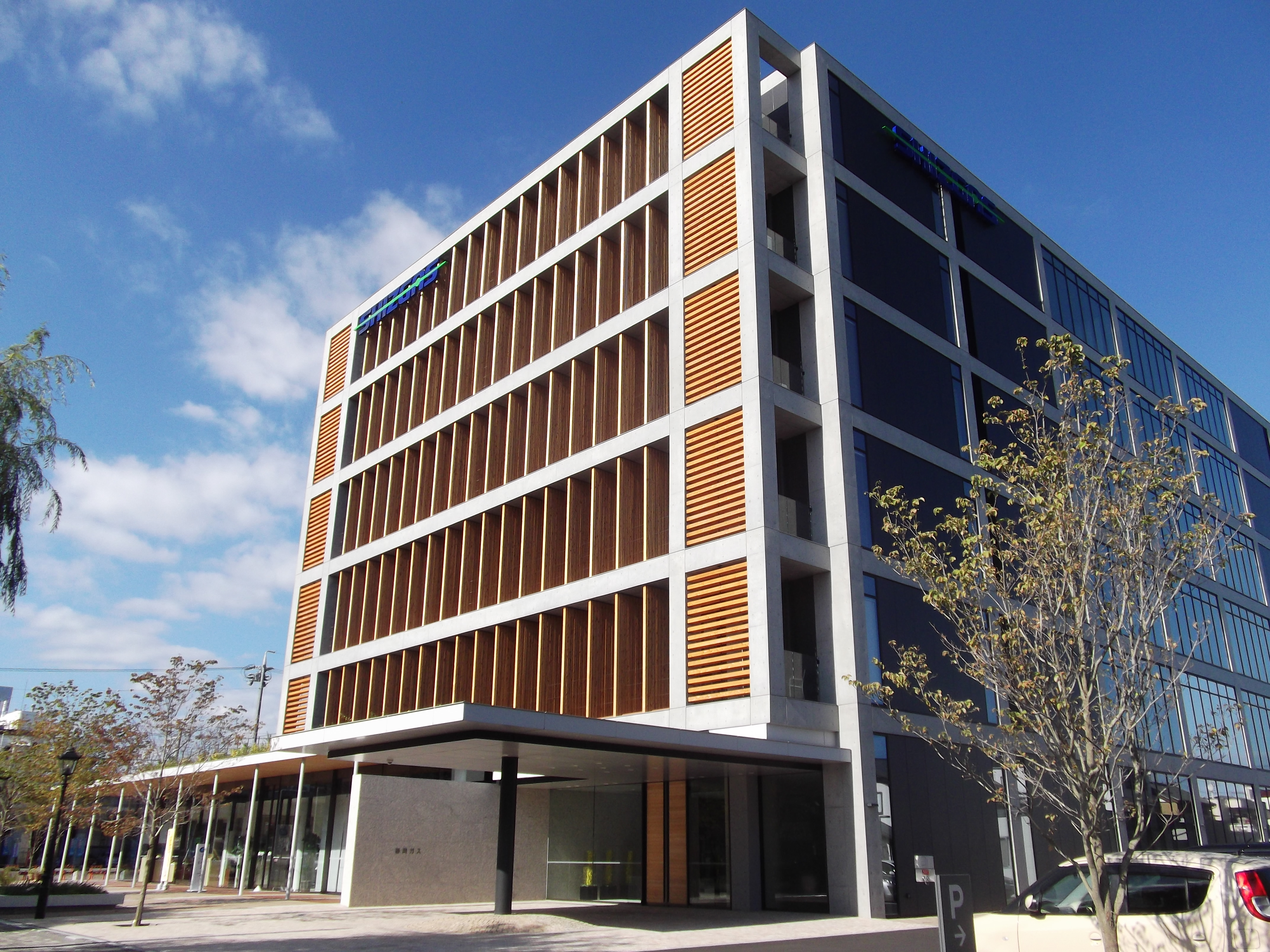 静岡ガス本社ビル（静岡市駿河区八幡）